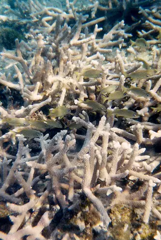 La flore marine